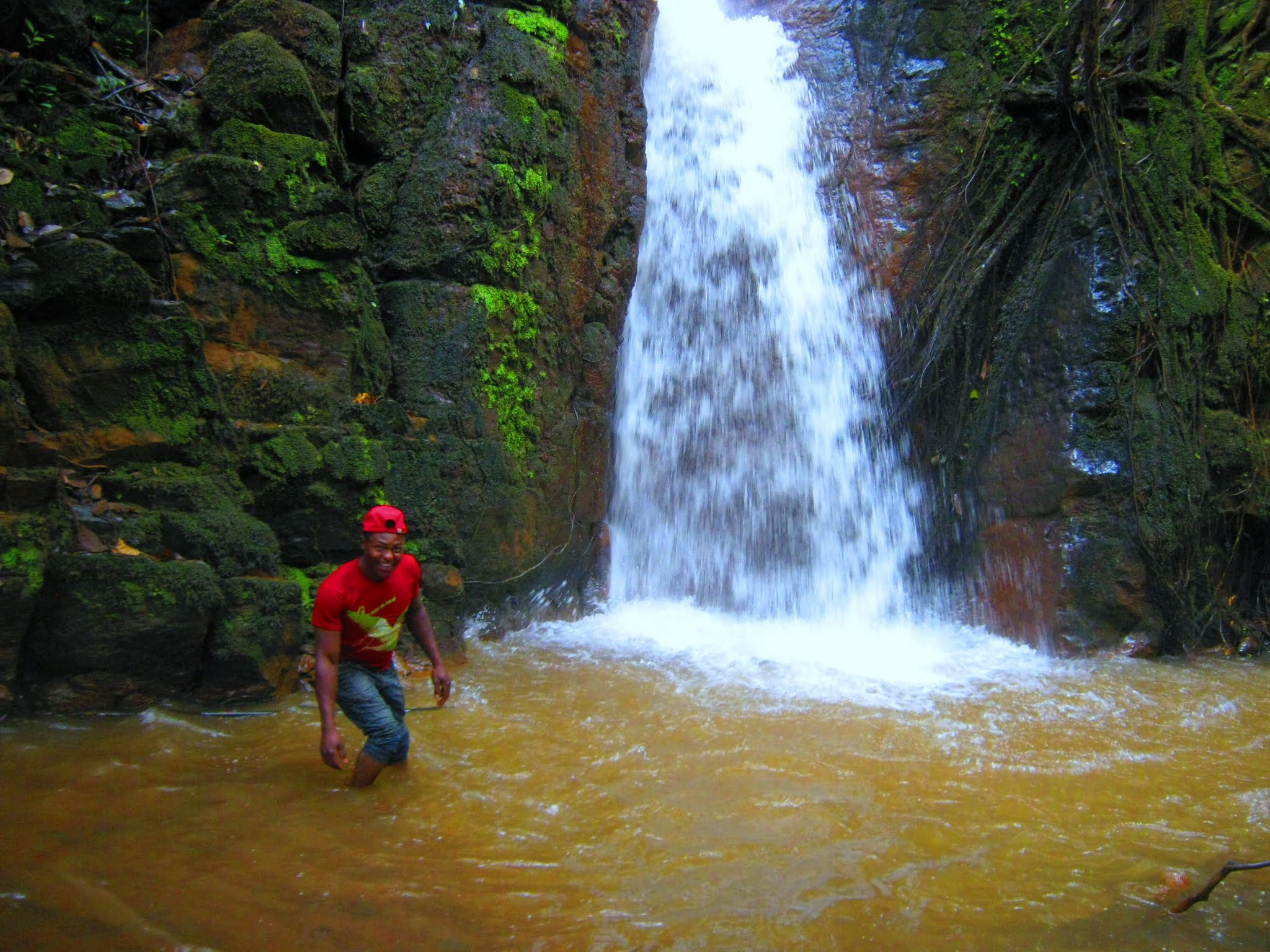 Les chutes de Tchélépi sont un lieu sacré situé à Bamougong, quartier Bameghang. Les gens viennent de tous les horizons du Département des Bamboutos pour y faire des sacrifices et des offrandes aux dieux.